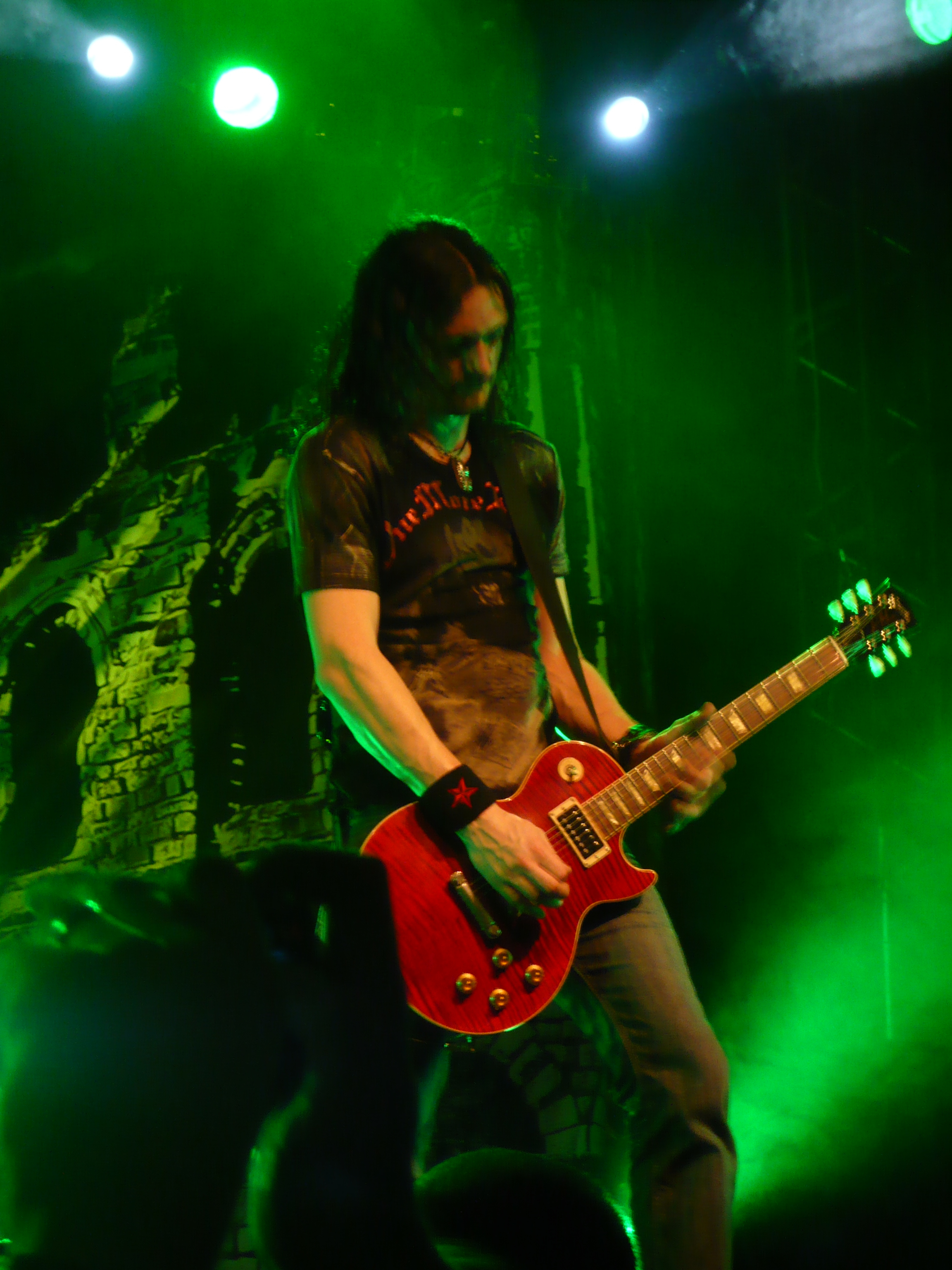 Jens Ludwig Edguy 13/01/09 Elysée Montmartre (Paris)